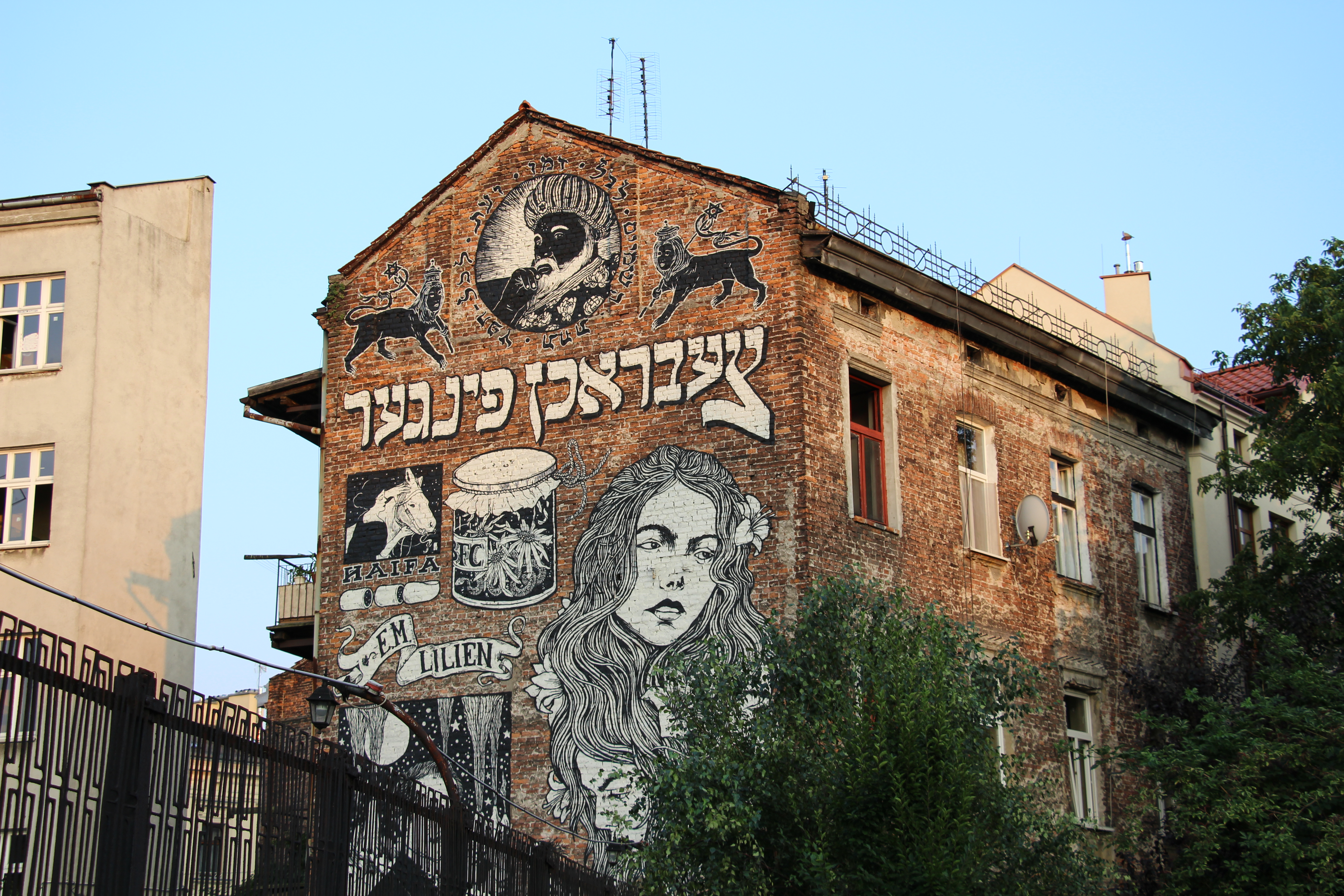 Kazimierz. Plac Bawół Murals